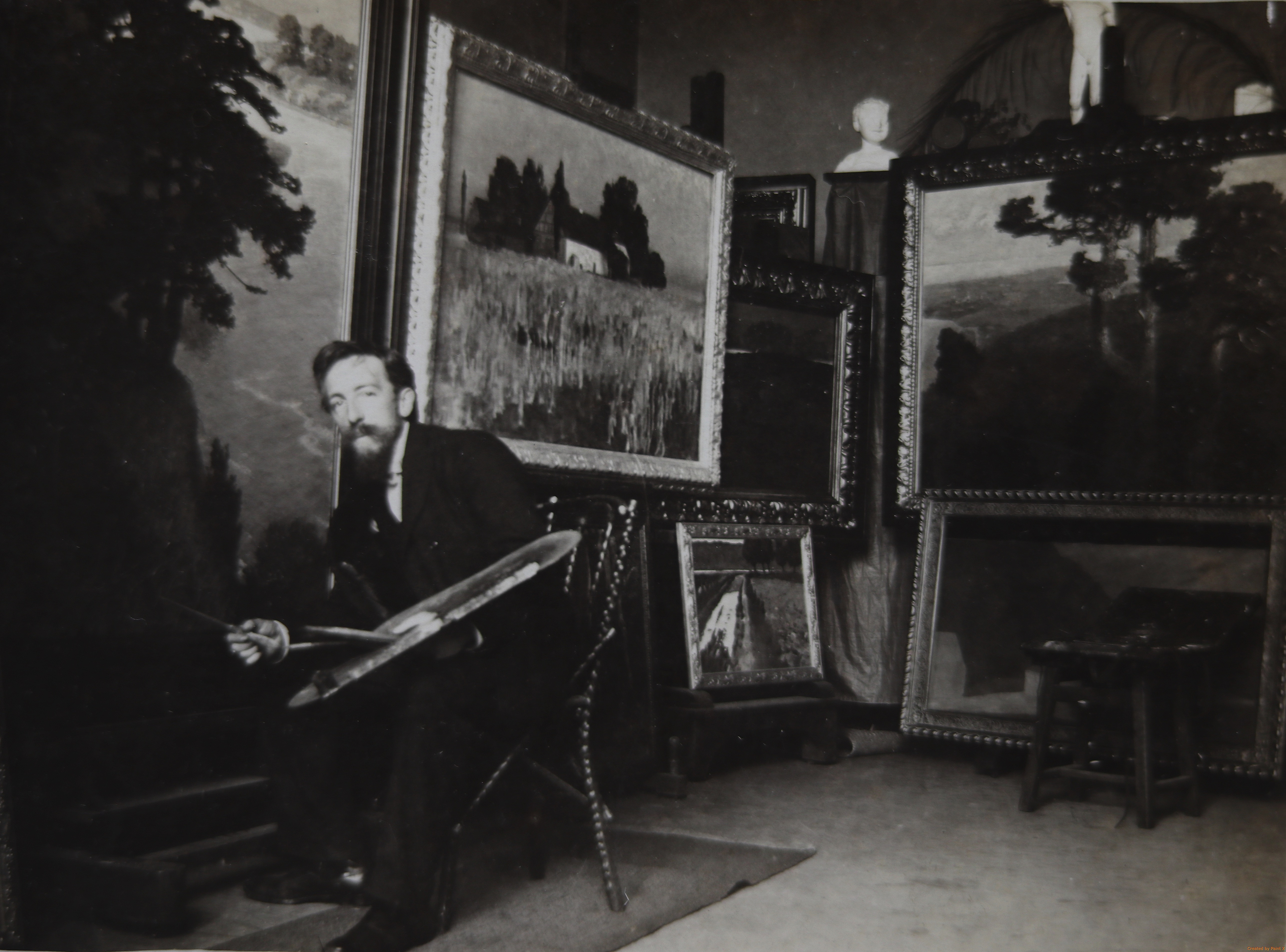 Hans Licht beim Malen im Atelier